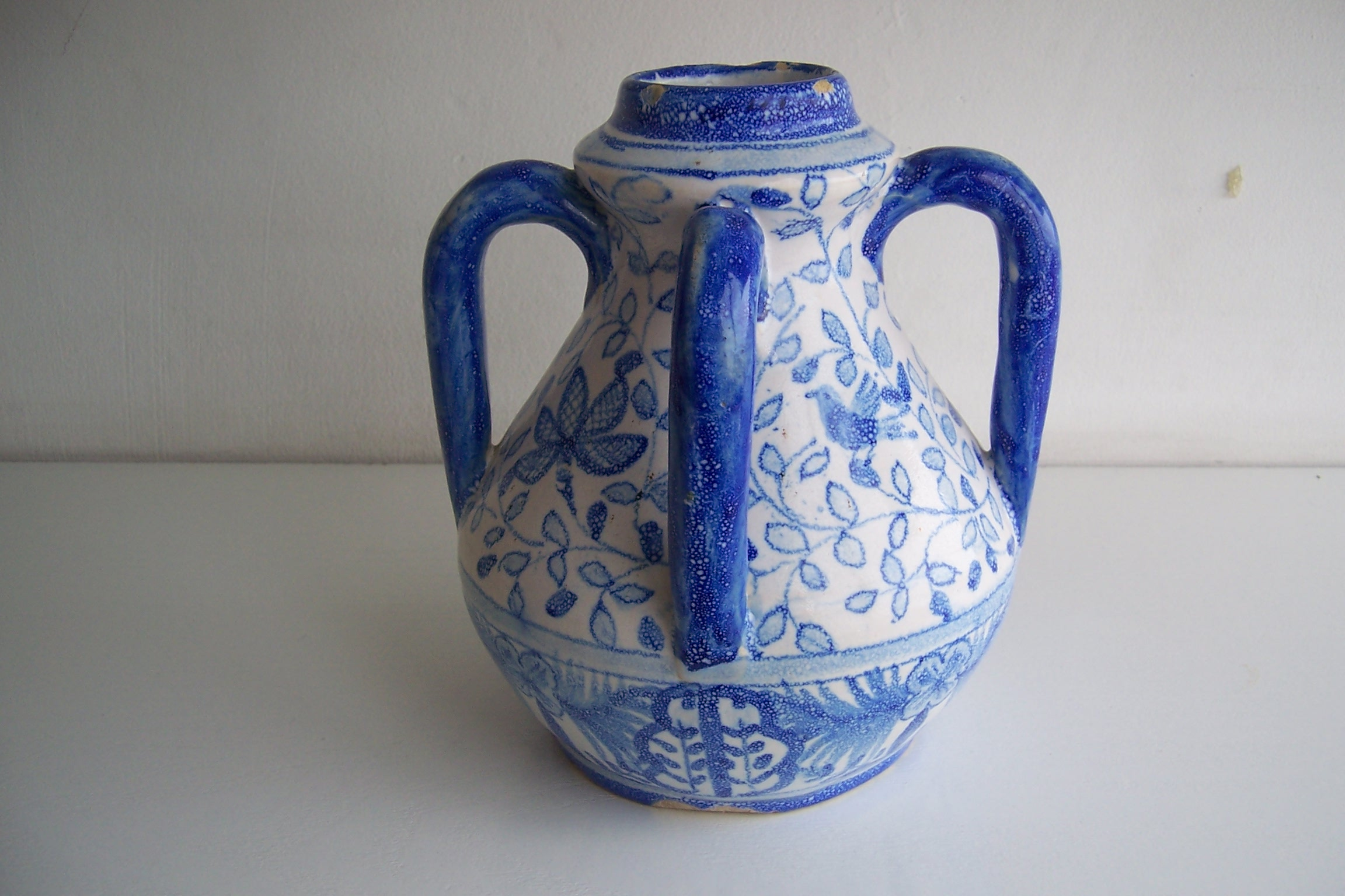 Jarrón de cerámica de Talavera. Sin catalogar y sin firma.